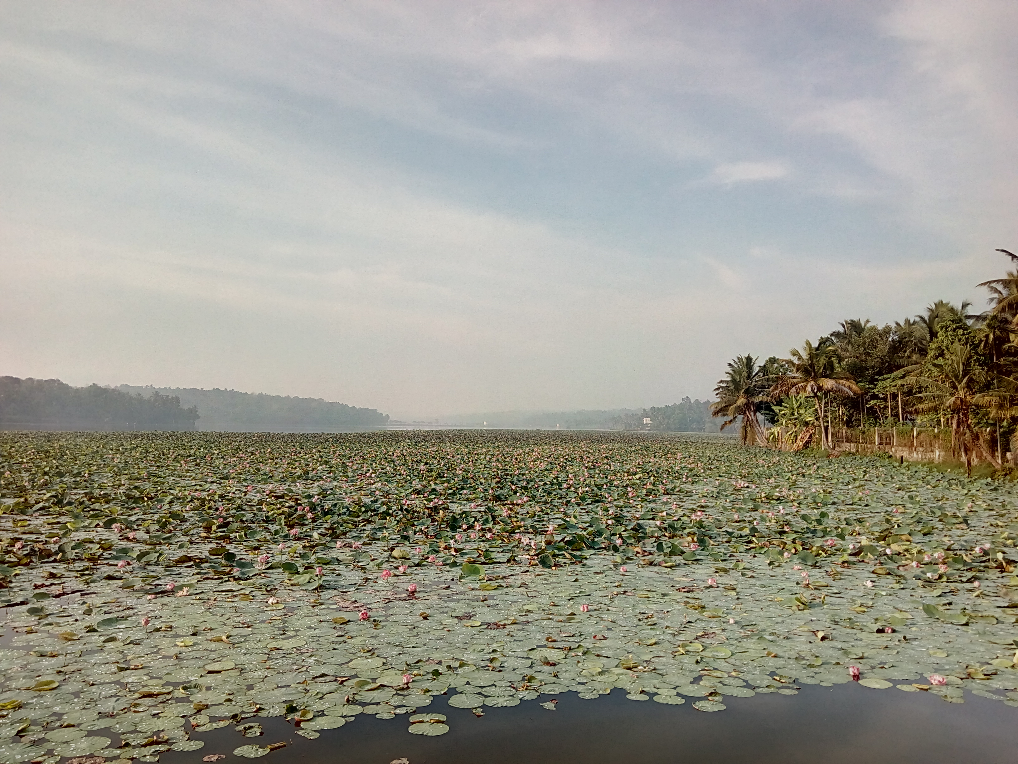 Vellayani lake at vavvamoola bund road